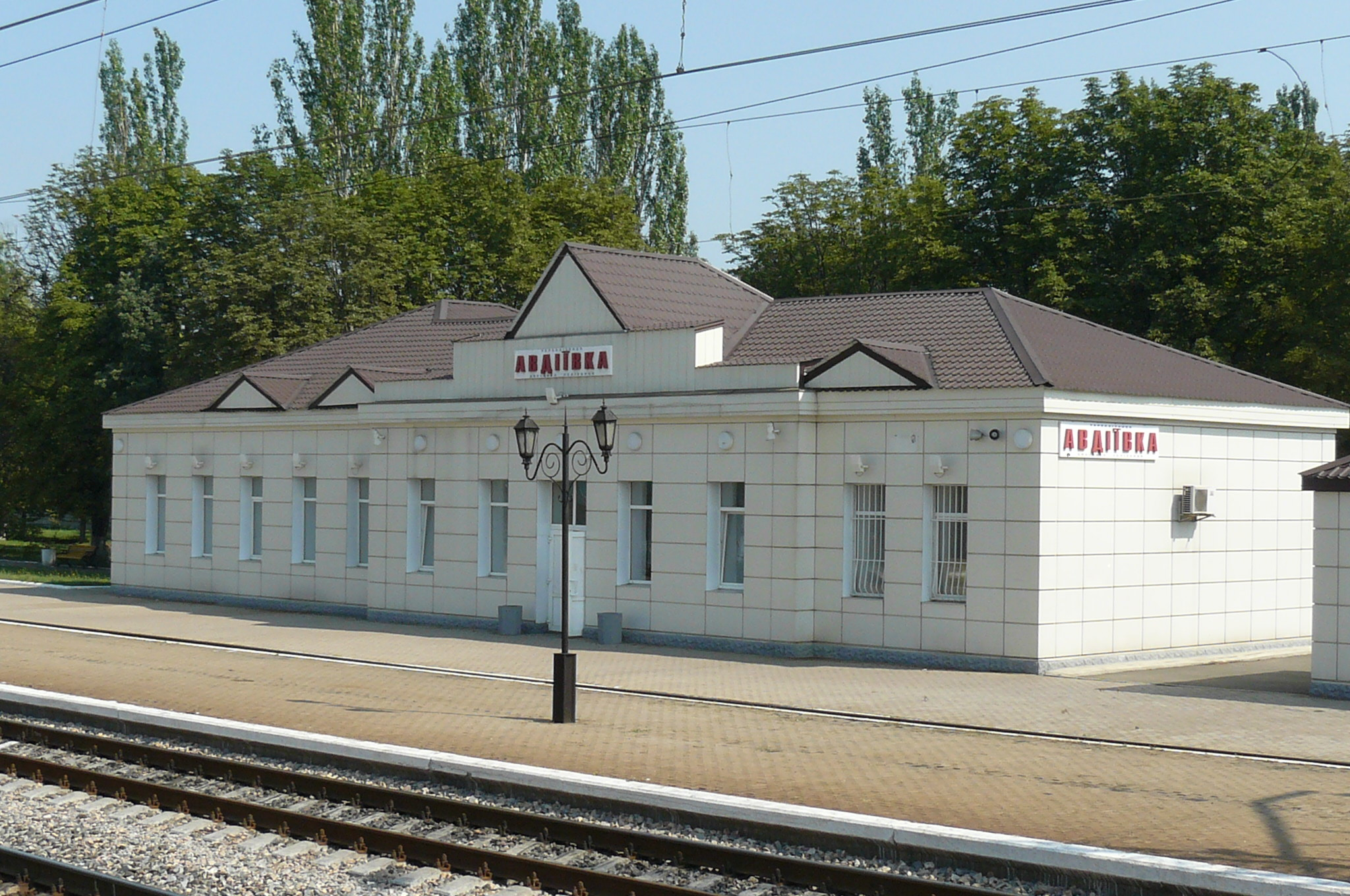 Avdiivka, train station, juni 2012.